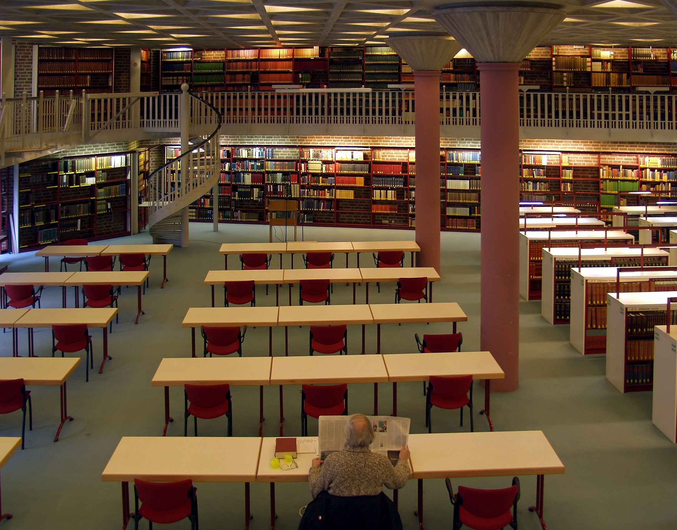 Lesesaal der Erzbischöflichen Diözesan- und Dombibliothek Köln, im Maternushaus